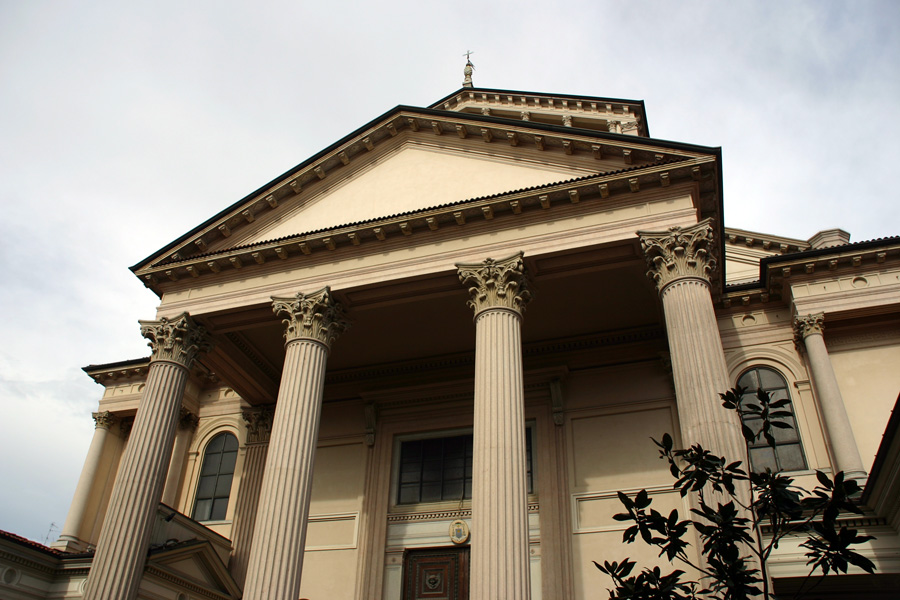 Facciata del Duomo di Novara.